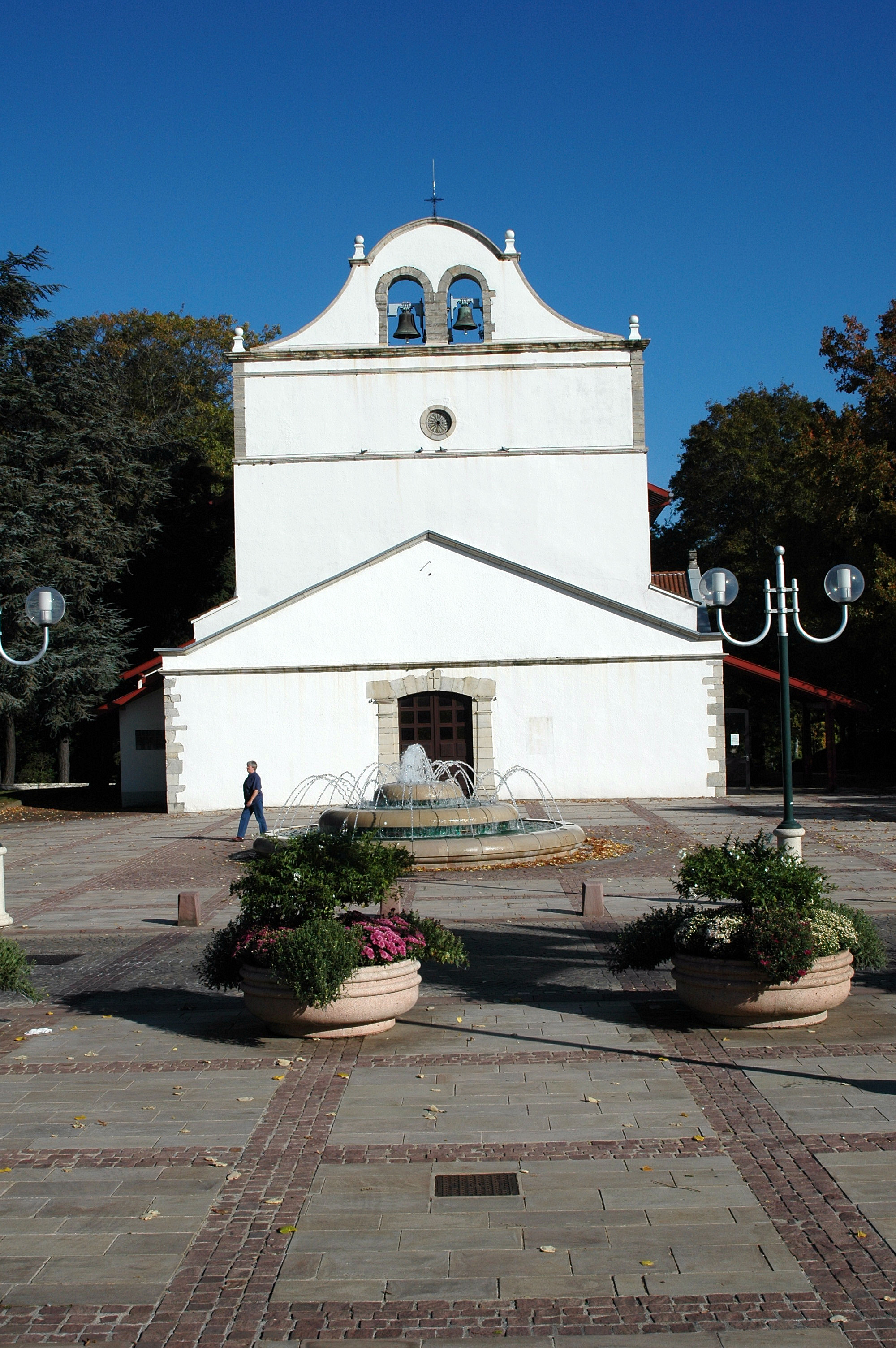 Anglet, église Saint Léon. Photo prise le 16/08/06 par Harrieta171